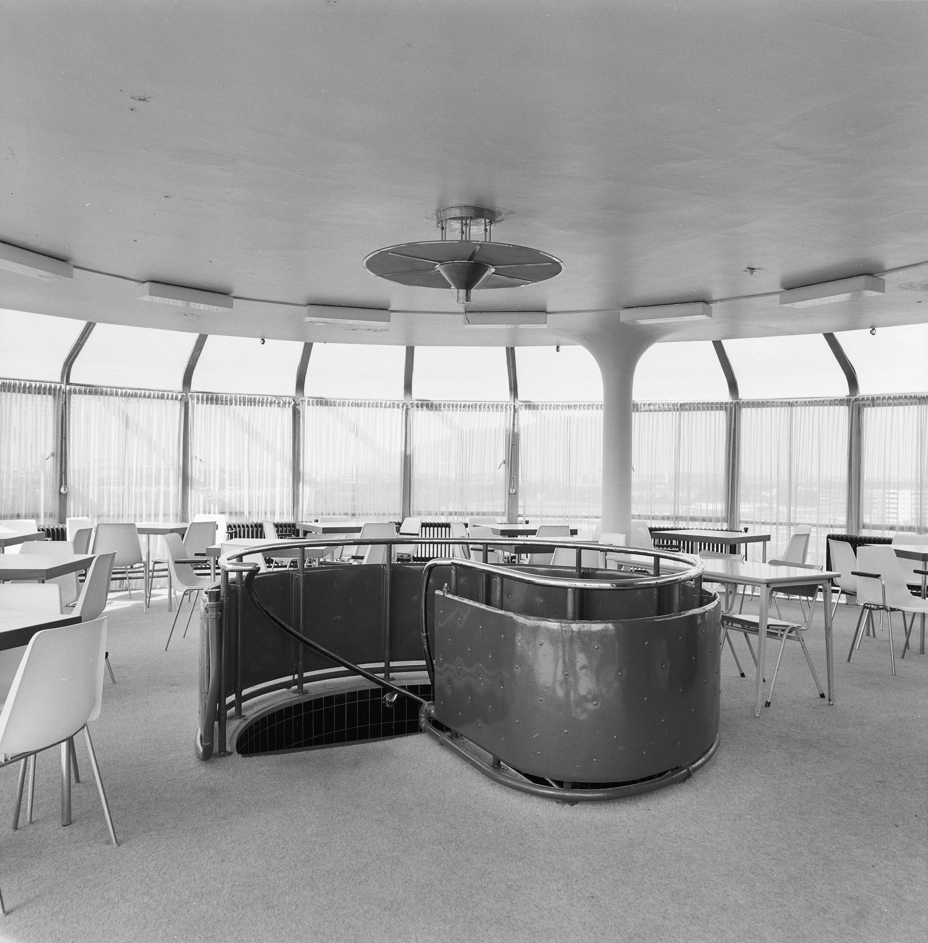 Van Nellefabriek: interieur kantoorzaal